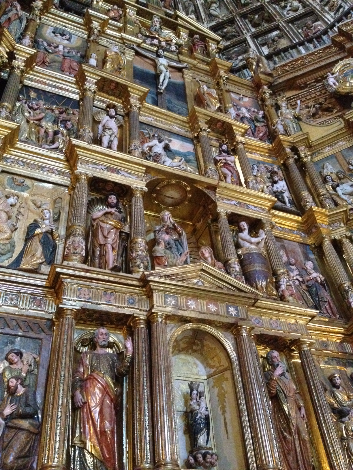 Retablo manierista de la capilla mayor en donde es capital la intervención del maestro Pablo de Rojas. Iglesia del Monasterio de San Jerónimo (Granada)